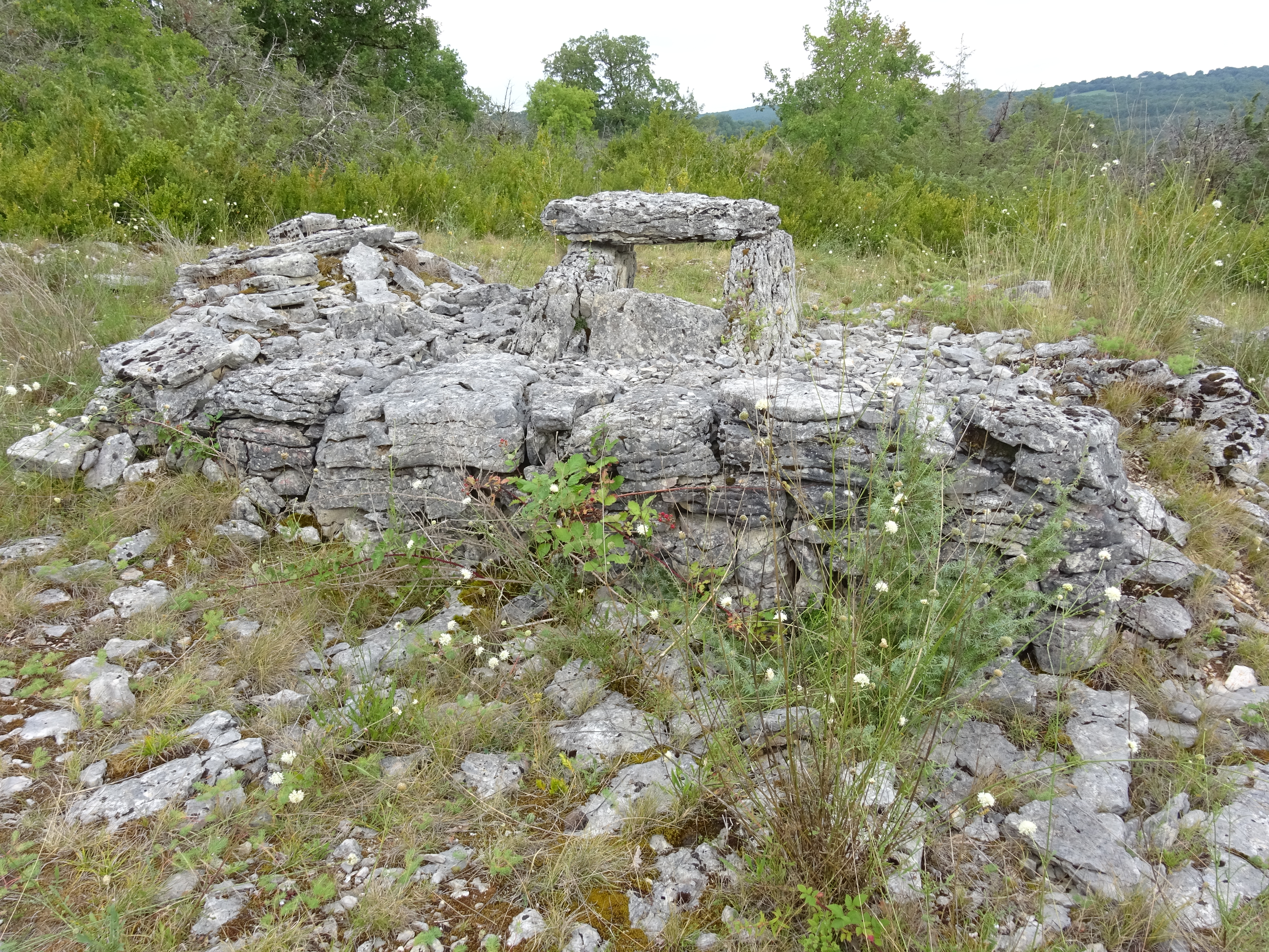 Dolmen de la Devèze, commune de Marcilhac-sur-Célé, Lot. Nord-Ouest.